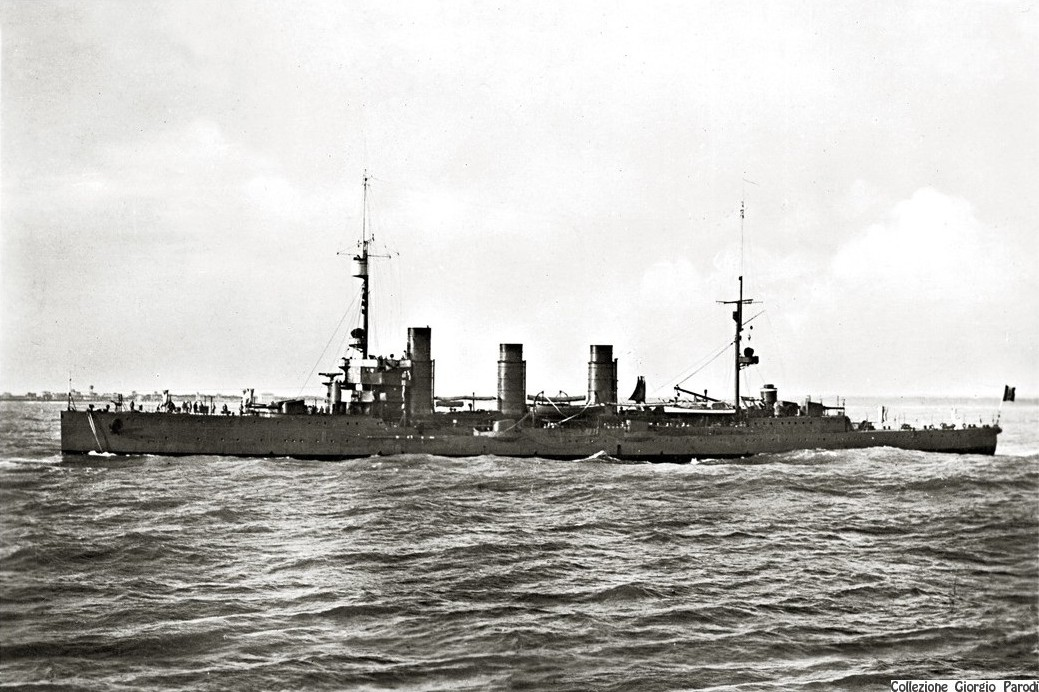 L’incrociatore leggero Bari.